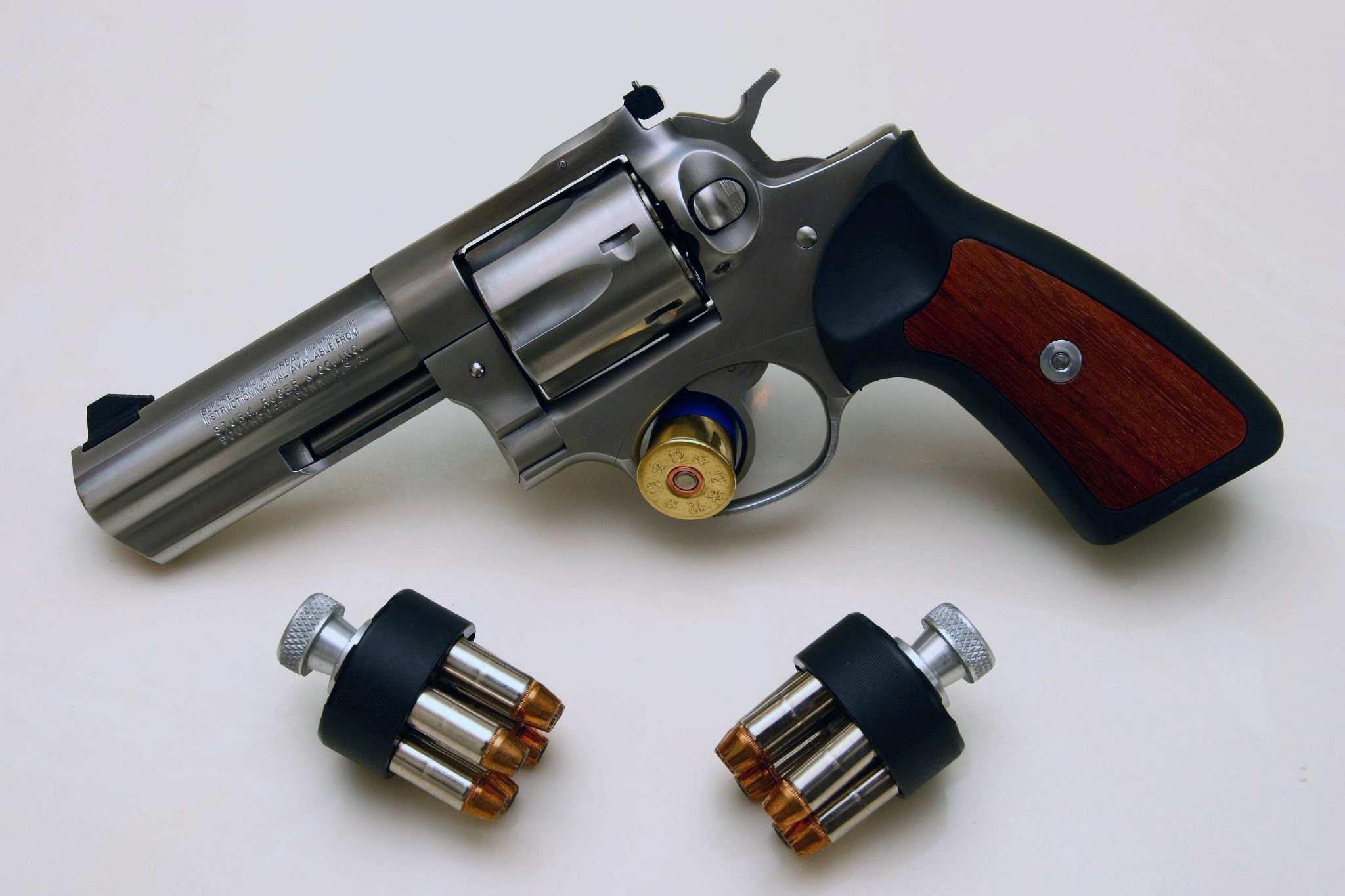 Ruger GP100 stainless steel revolver - 357 Magnum